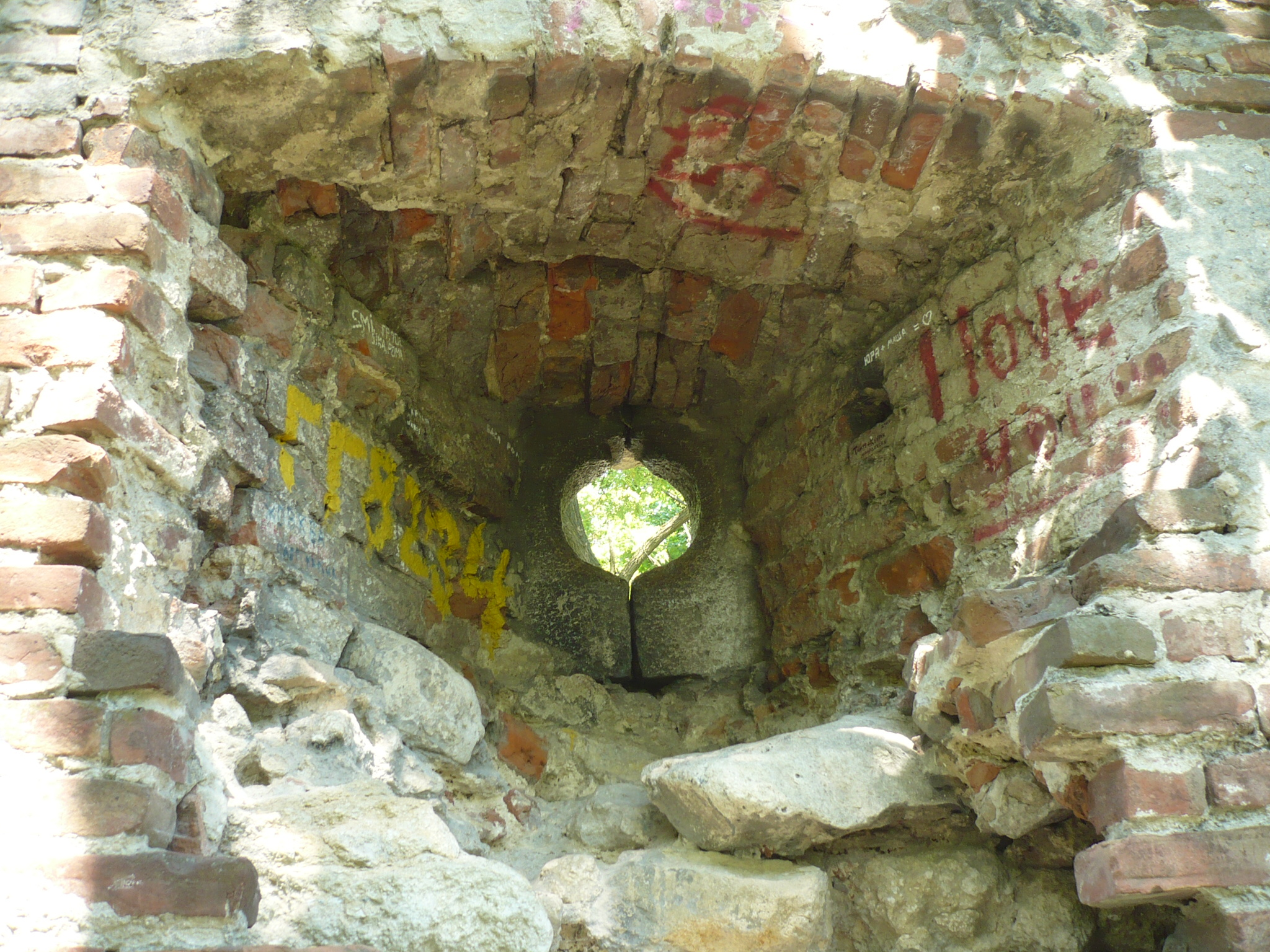 Lwów. Wysoki Zamek